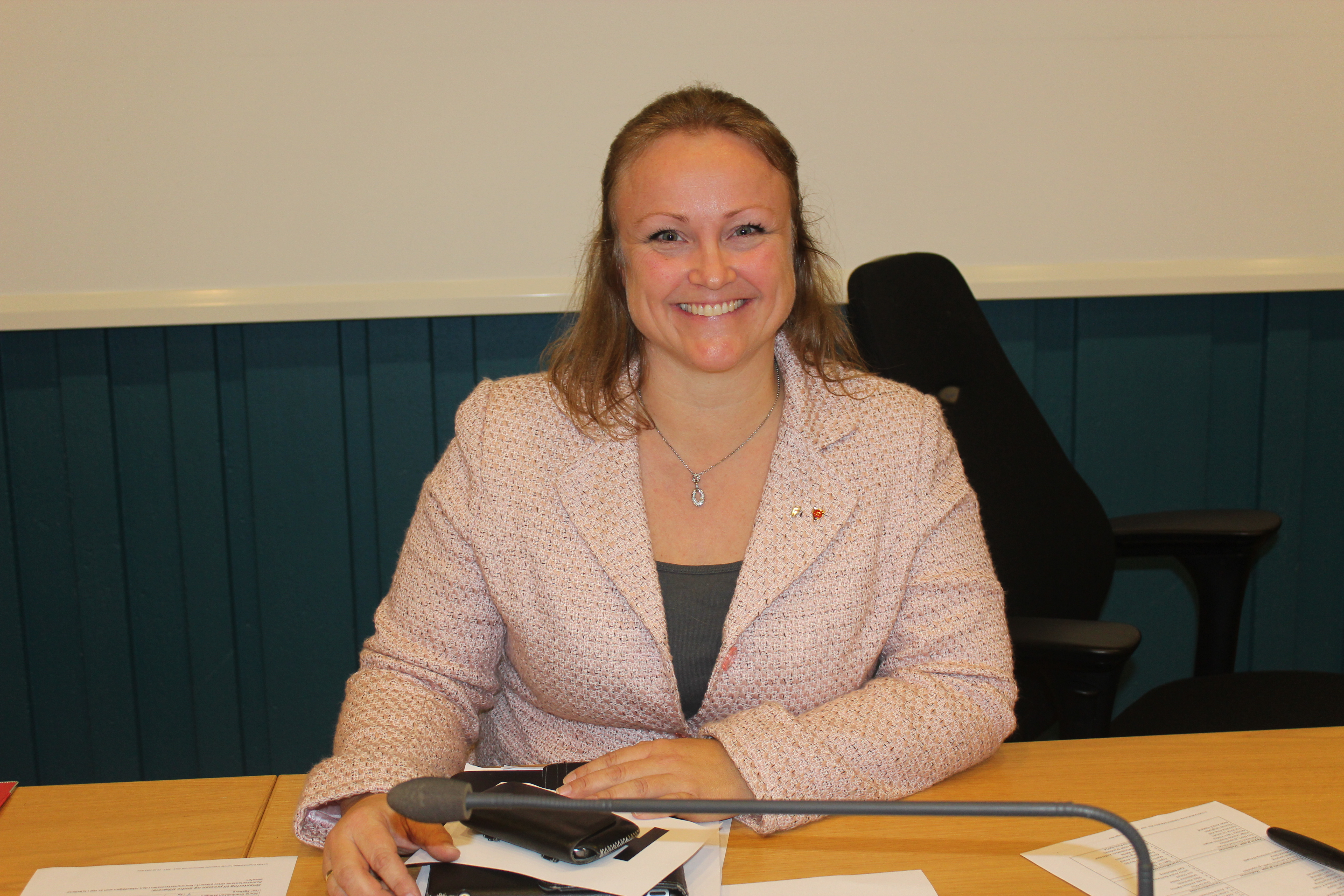 Anette Carnarius Elseth, varaordfører i Sørum (2015)